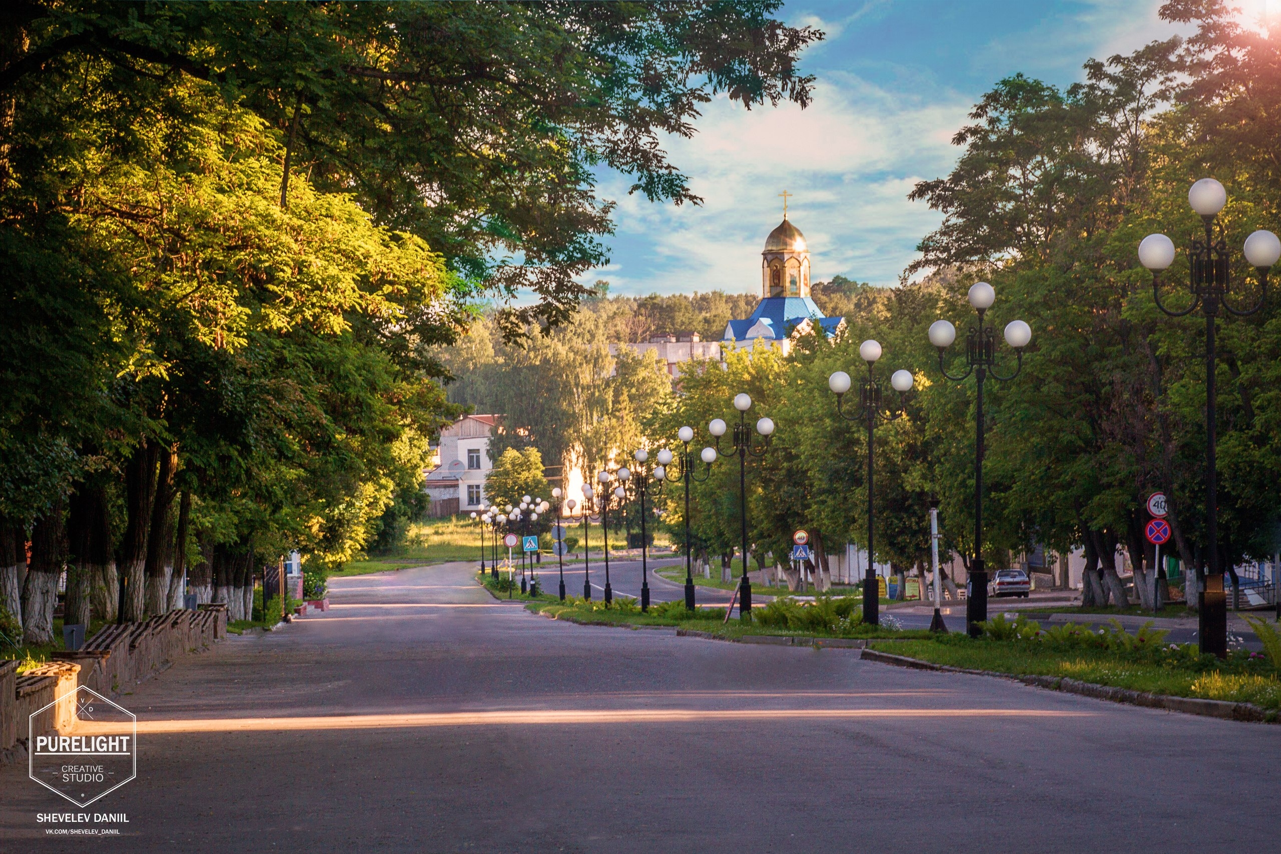 улица Ленина